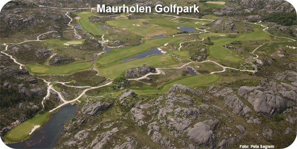 Flyfoto over Maurholen golfpark